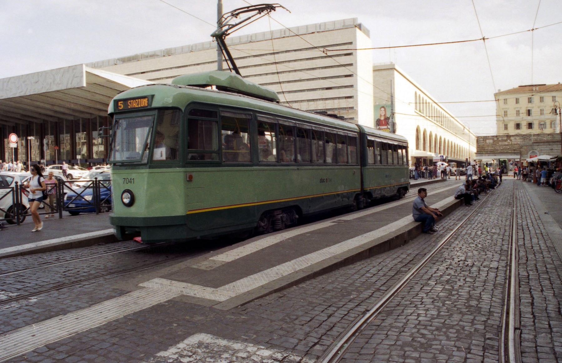 Capolinea tram ATAC accanto alla stazione Termini (2015), con il TAS 7041 sulla linea 5. Licensing Categoria:Immagini di Indeciso 42 controllate